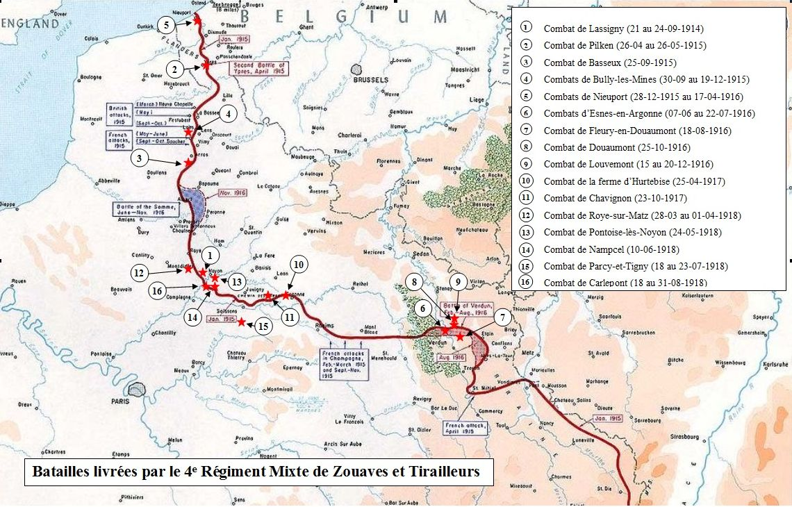 Campagnes du 4e Régiment Mixte de Zouaves et Tirailleurs tunisiens pendant la Première Guerre Mondiale